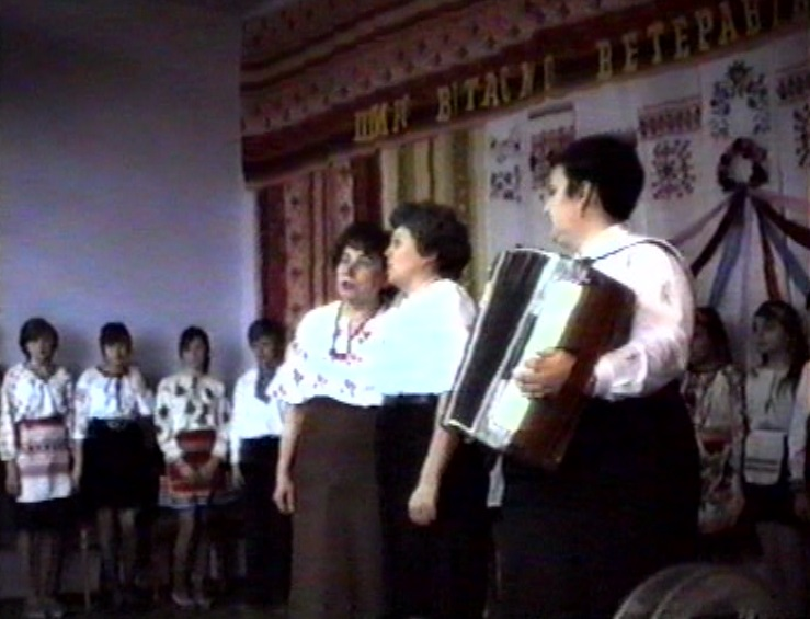 Зустріч ветеранів у селі Мар'ївка Баштанського району 1994 р.